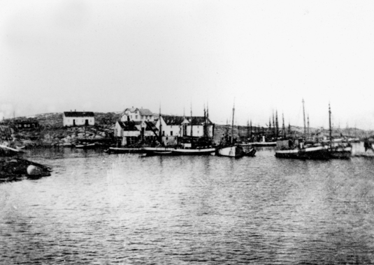 Fiskebåter ved havn i Nordøyan ca 1910. Ukjent fotograf. Unknown source: "Kystmuseet i Nord-Trøndelag"!